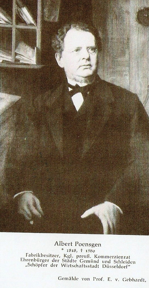 Scan eines Portraitgemäldes